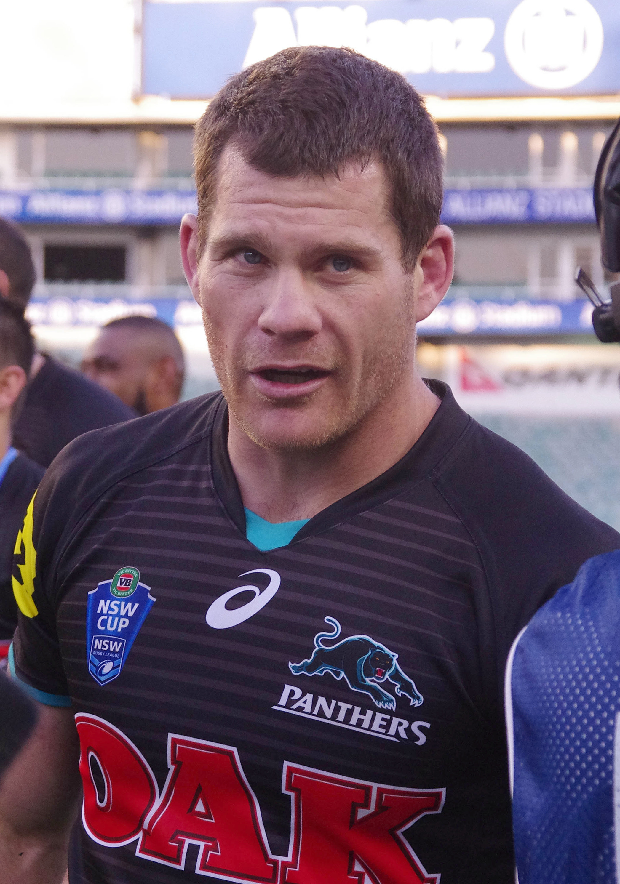 KEVIN KINGSTON